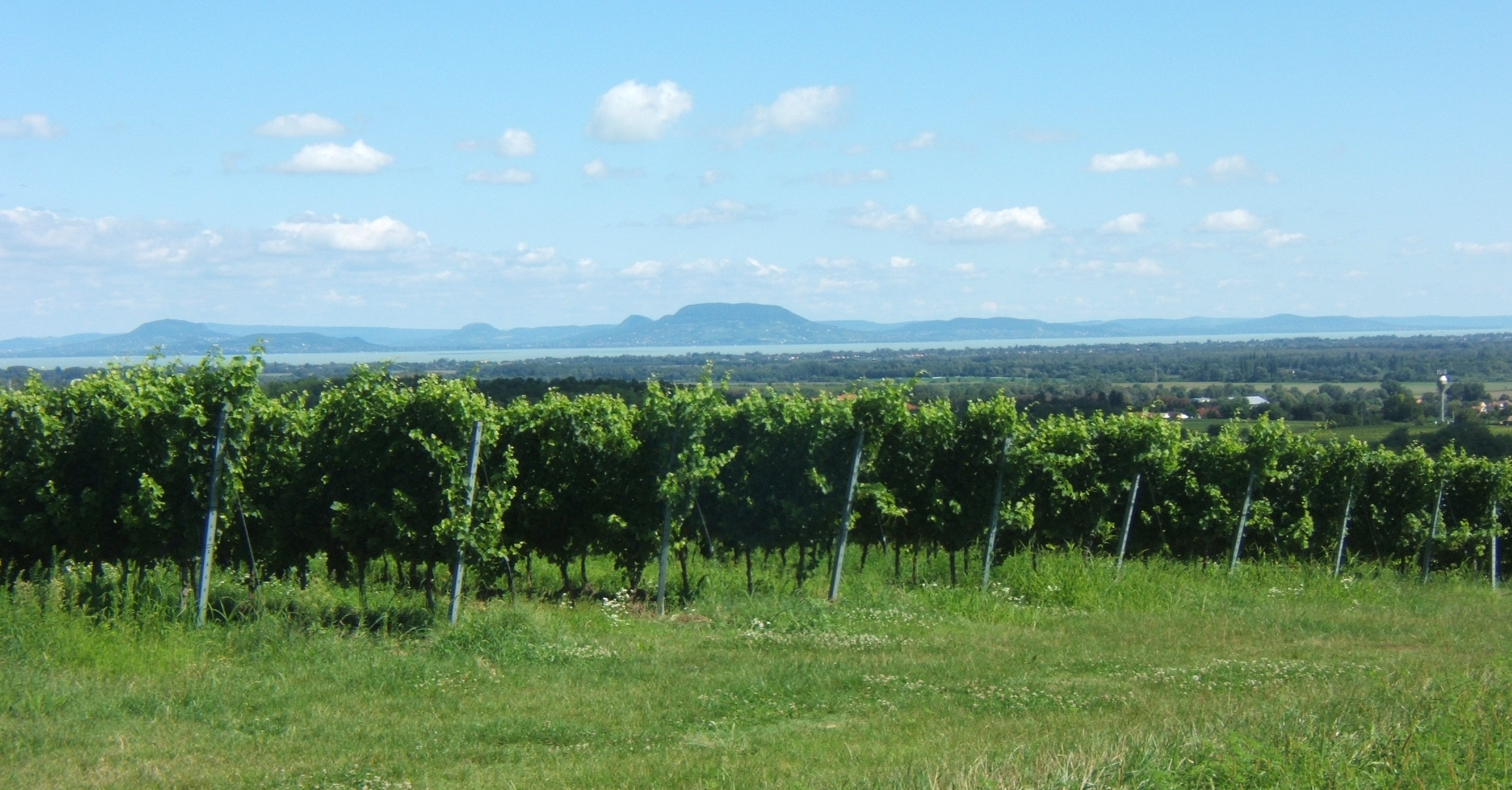 Kéthely, szőlőhegy